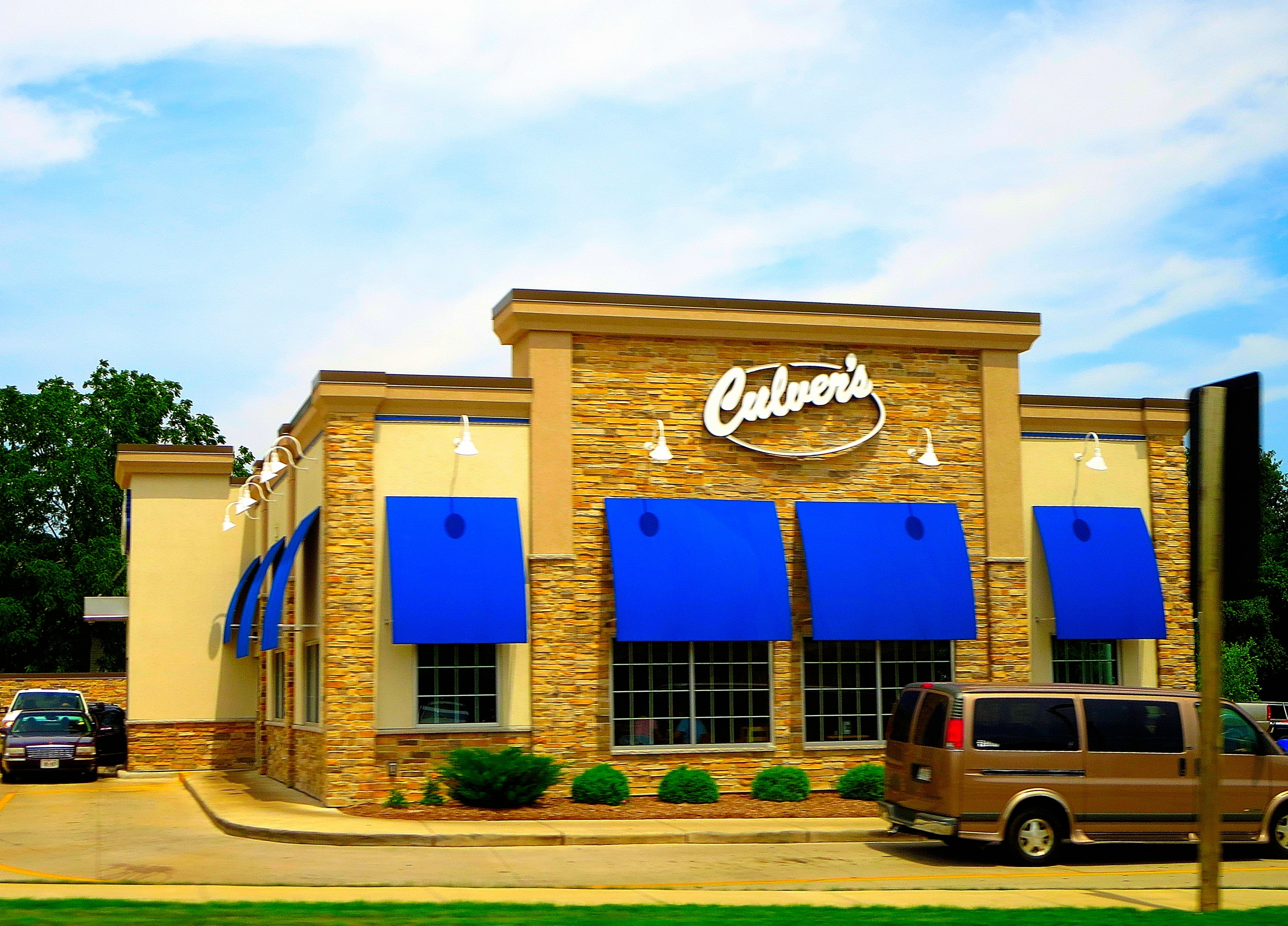 Culvers®